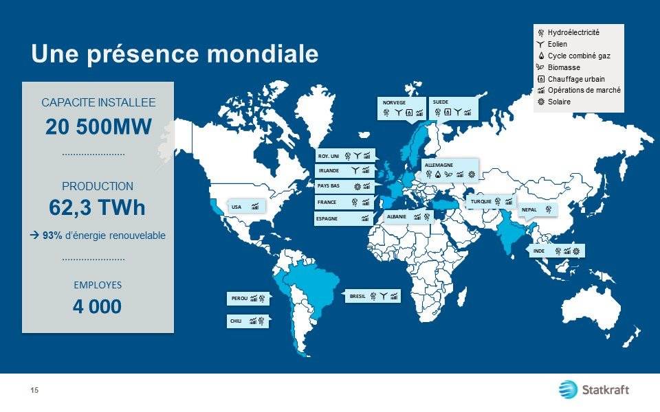 Carte des implantations de statkraft en 2020